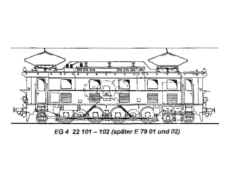 Prinzipskizze der E 79 01